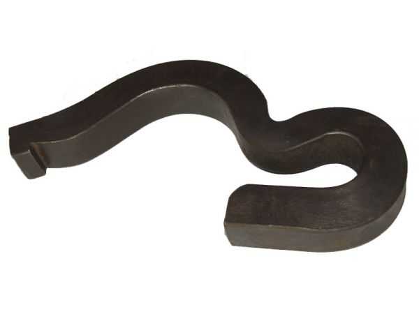 Противоугон — устройство для защемления подошвы рельса и передачи продольных сил при движении подвижного состава на шпалы или подкладки; препятствует продольному перемещению рельсов — угону пути.